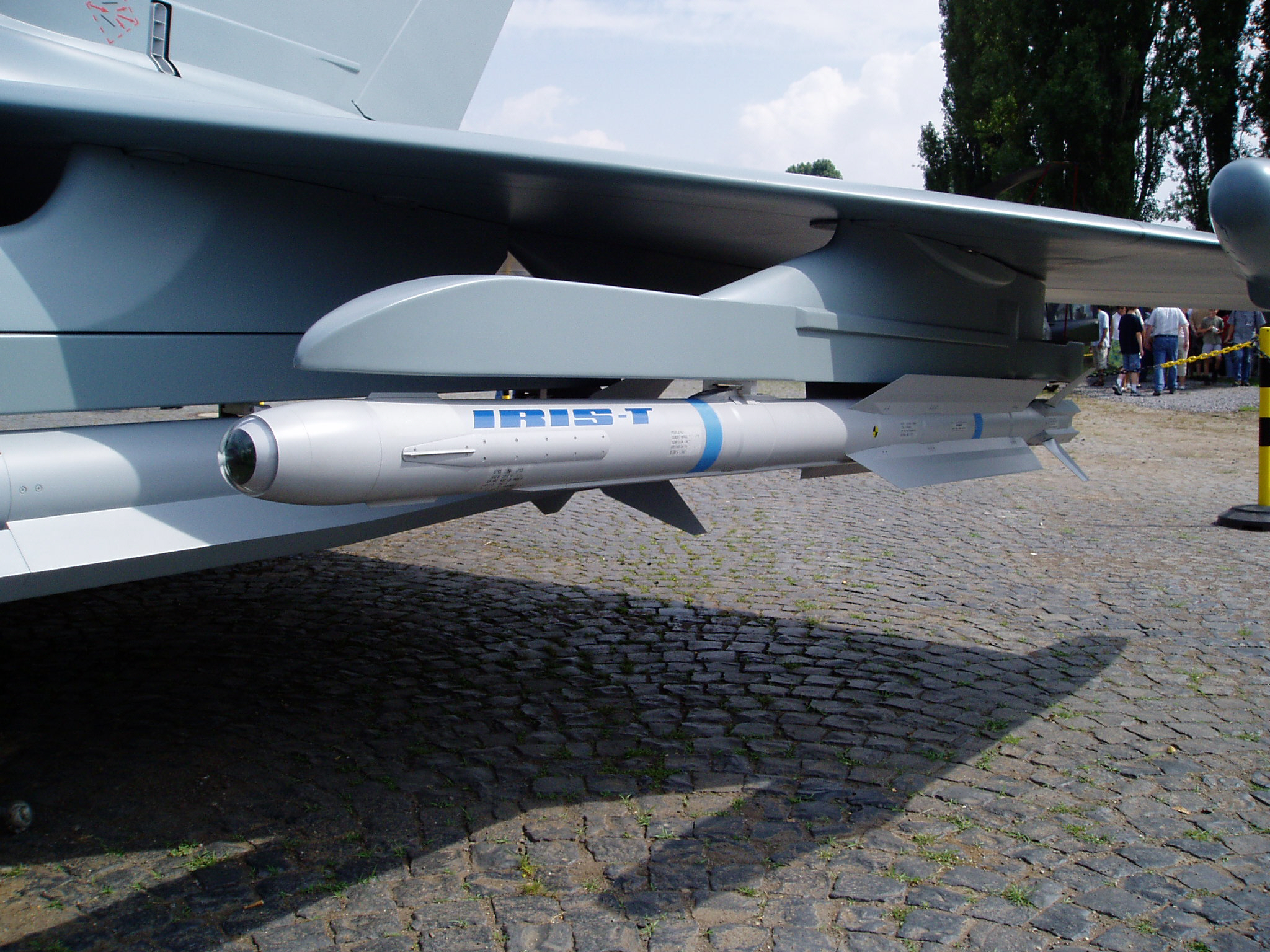 IRIS-T missile dummy